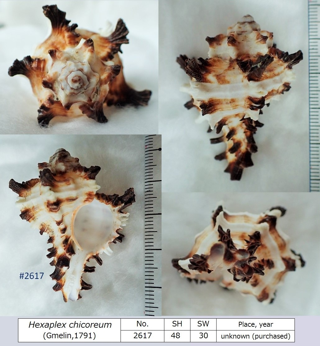 購入品のため産地は不明。